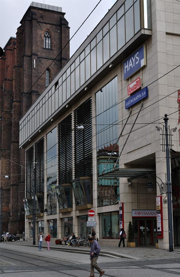 Jeden z najnowszych budynków na Starym Mieście. Uzupełnił on pustą przestrzeń powstałą po zniszczonych w czasie wojny kamienic oraz kamienicy na rogu Szewskiej i Oławskiej rozebranej chyba na początku lat 70.